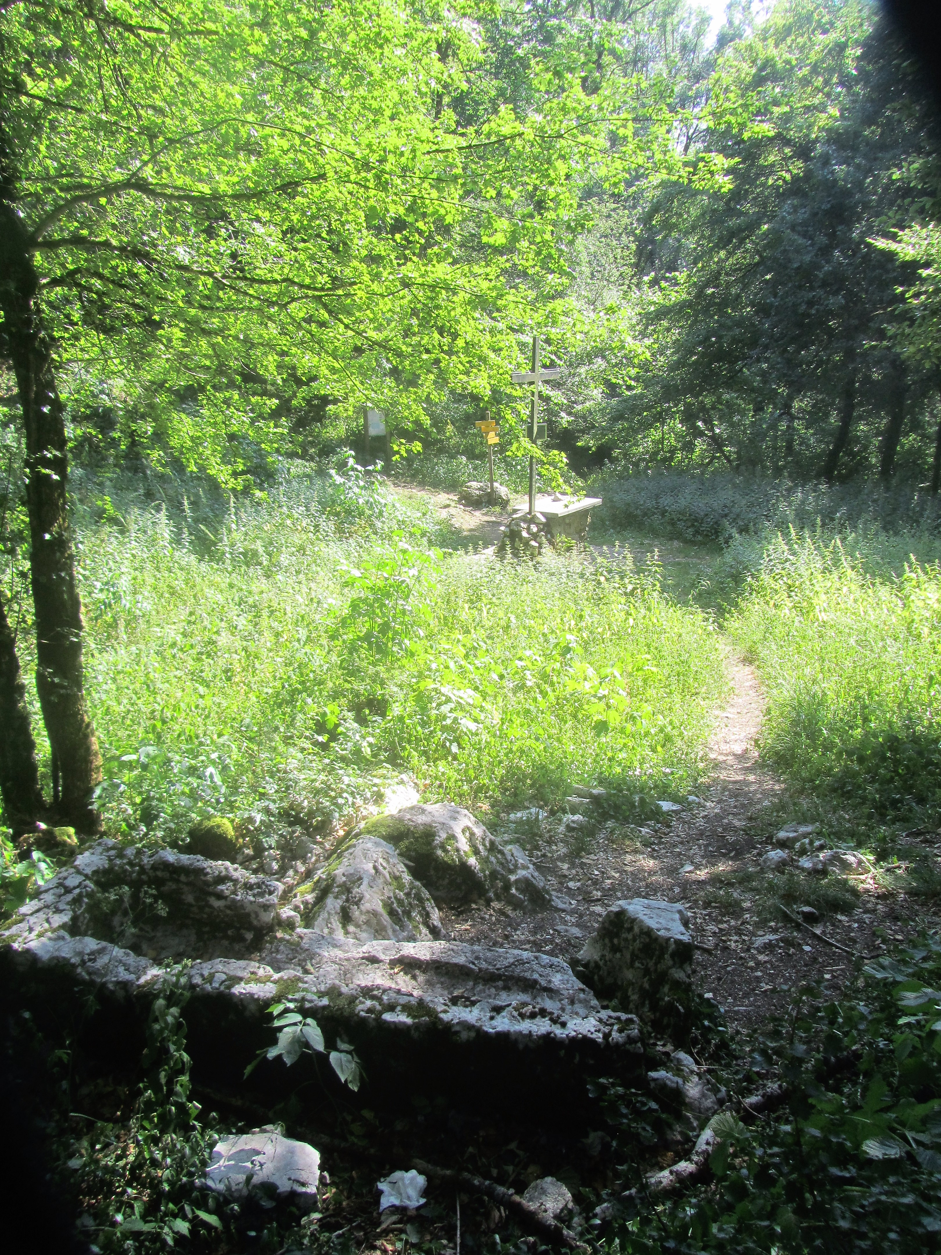 ce sarcophage atteste de la fréquentation ancienne du col Saint Michel